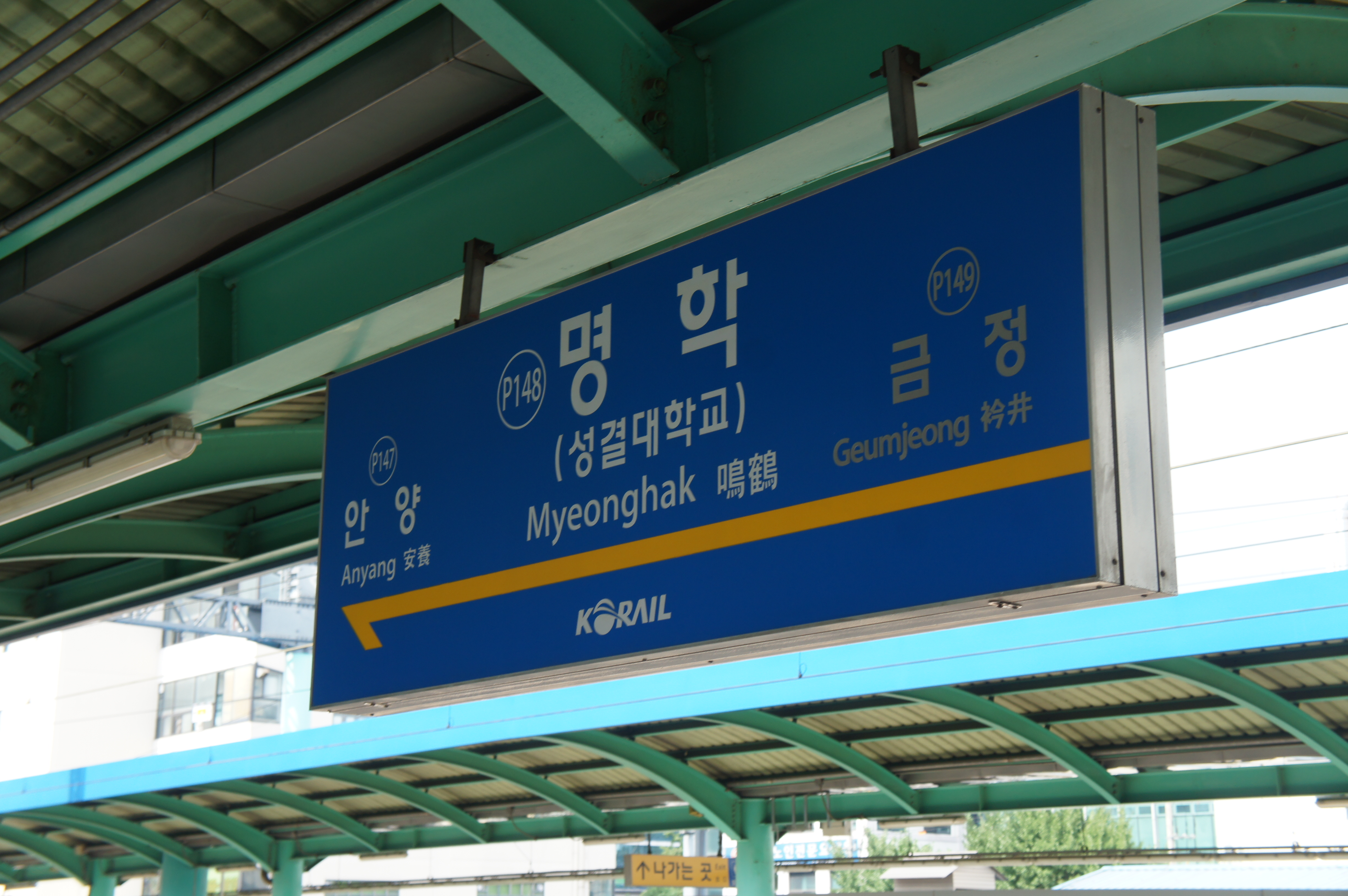 명학역 역명판